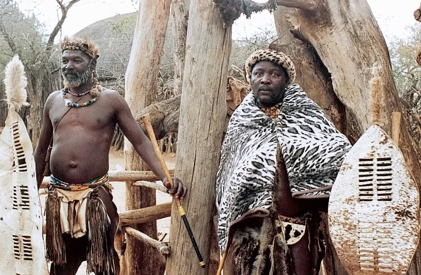 Copyright : FC Georgio Sujet : Zoulous (Shakaland), Lieu: Province du Natal, Afrique du Sud, Année : 1991